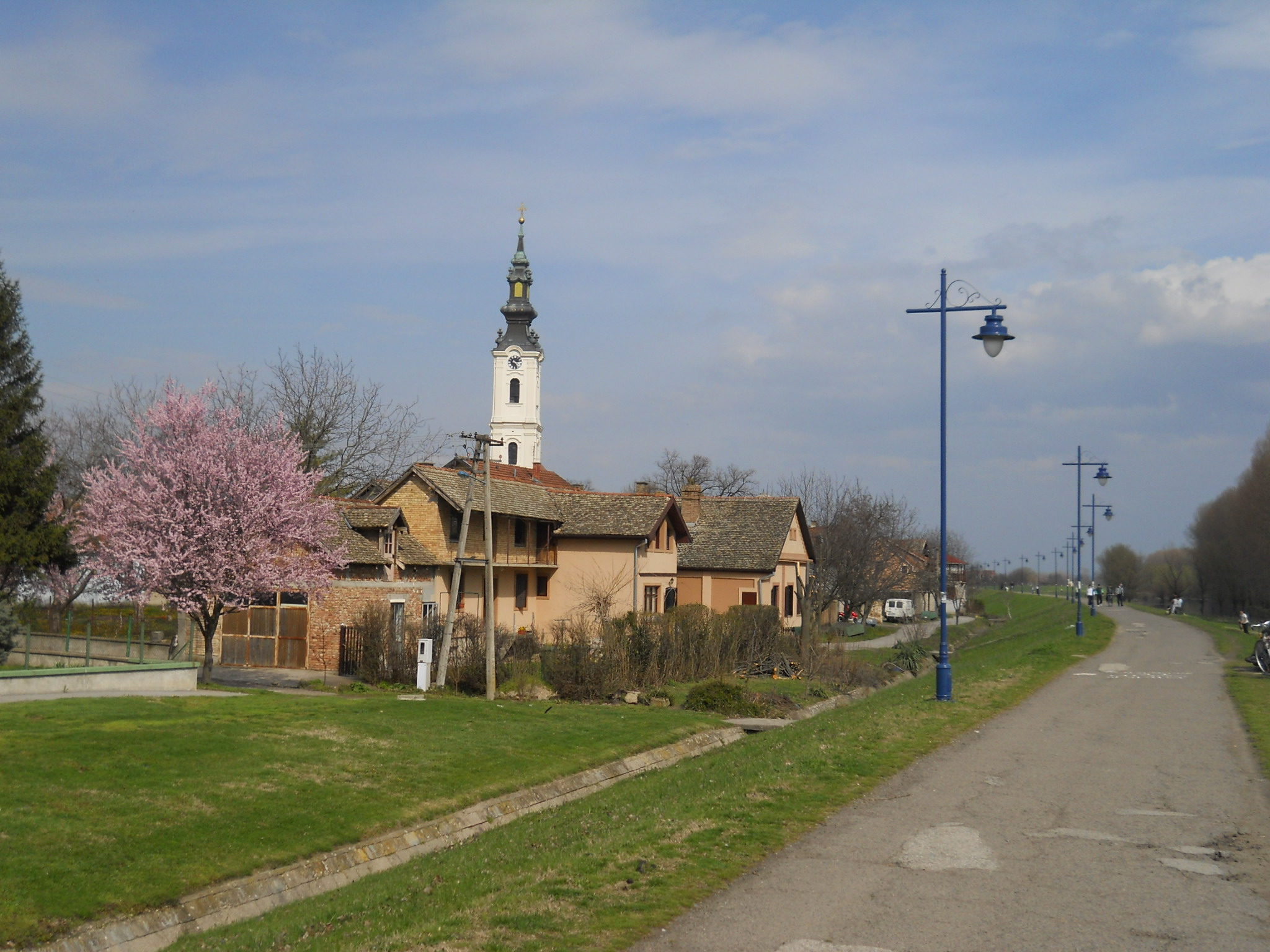 Futak - a Duna töltéséről